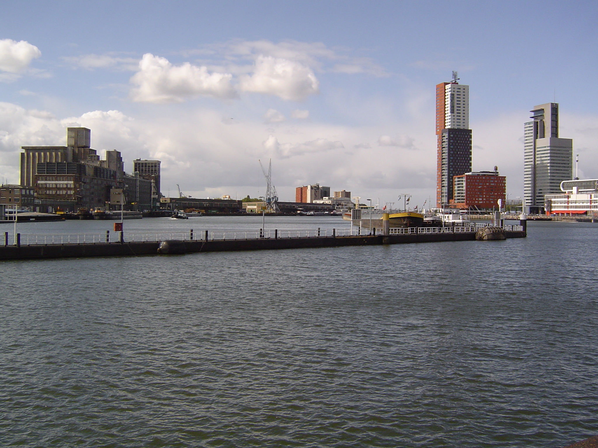 Rijnhaven Rotterdam, The Netherlands